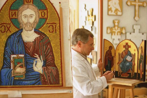 Spiridione (Dhoni) Marino, artista, mosaicista e iconografo arbëresh di Piana degli Albanesi, Monastero basiliano "Sklica".